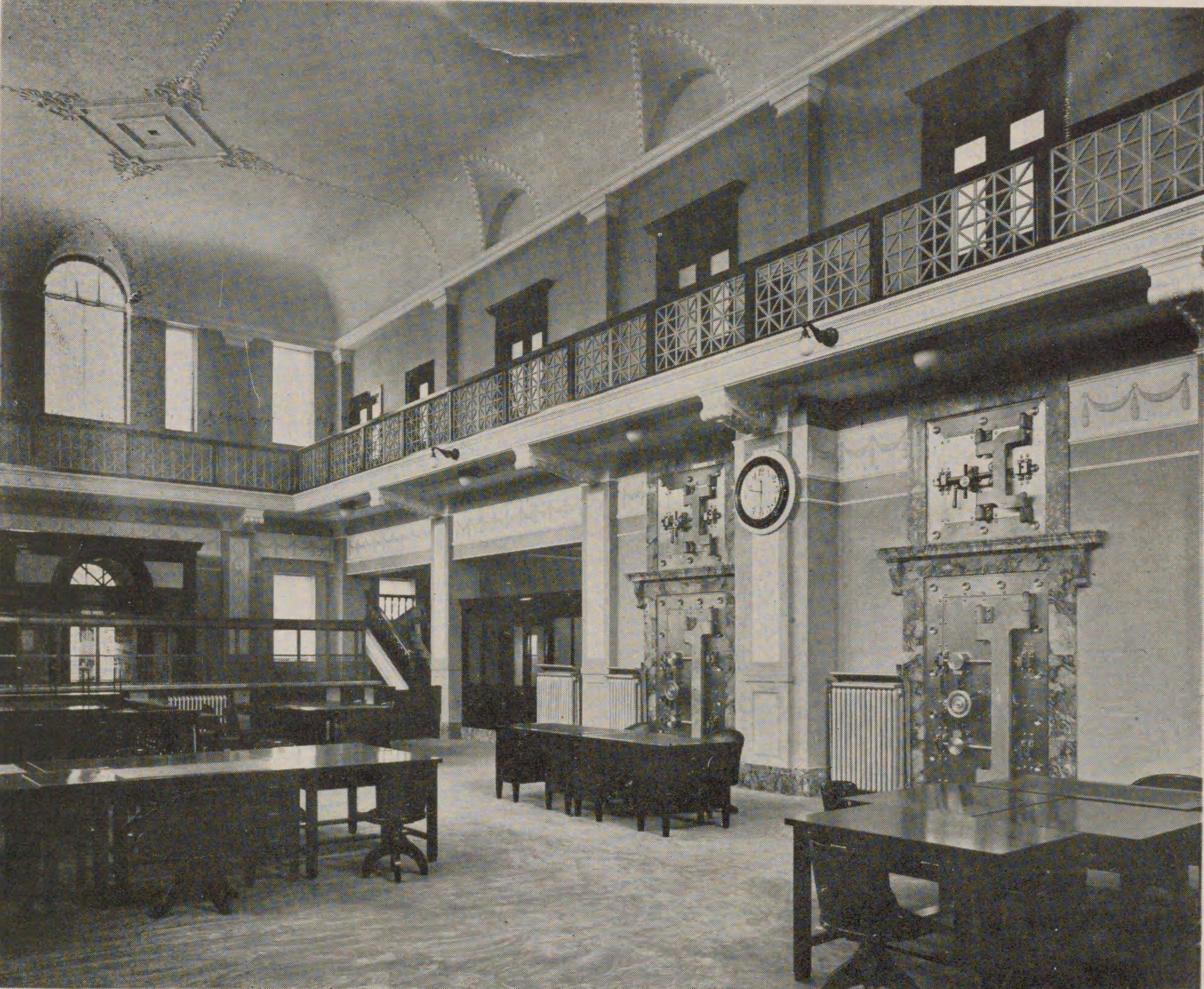 昭和初期の三井銀行広島支店の営業室（金庫室側）。